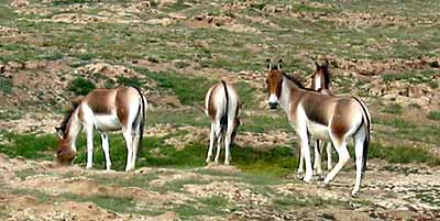 Kiang - tibetische Wildesel im Changthang Foto: Andreas Gruschke (Freiburg)